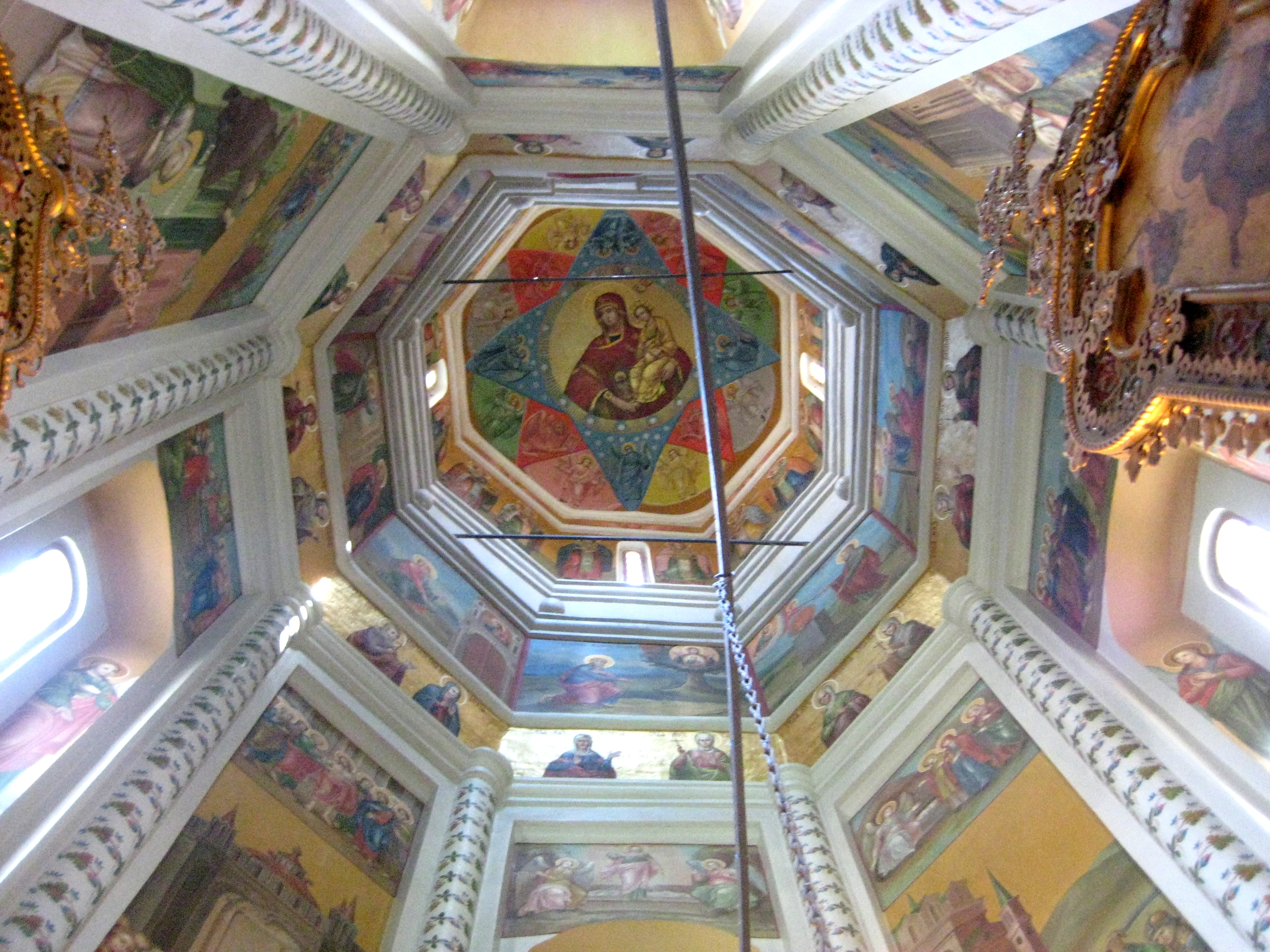 Собор Василия Блаженного. Интерьер